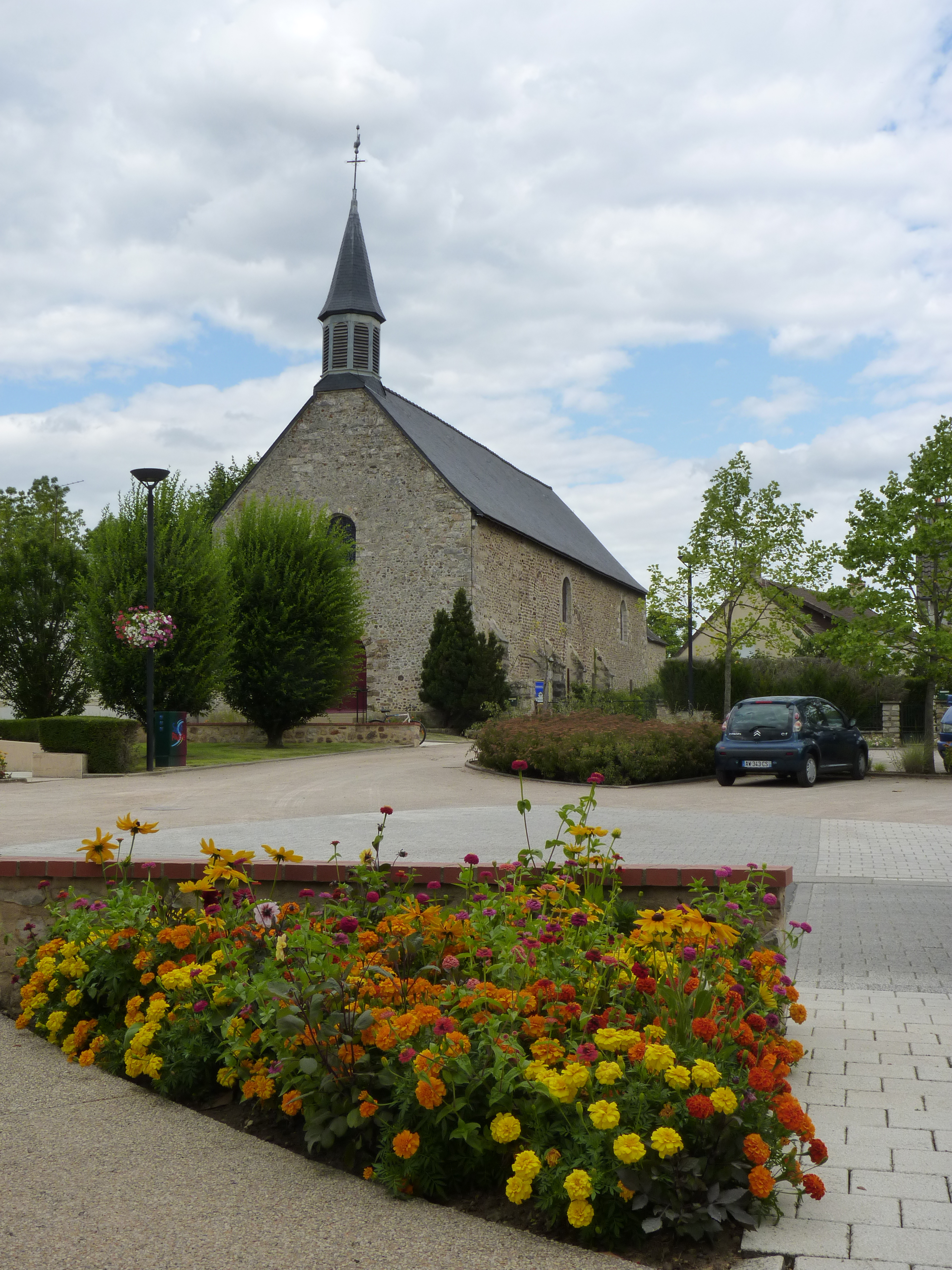 Eglise de saint pavace